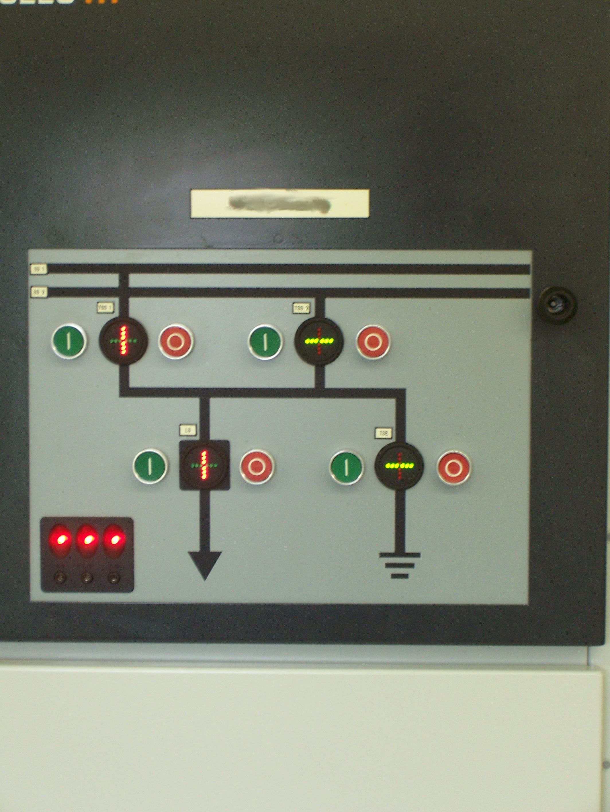 Bedienfeld eines 20-kV-Leistungschalters in einer Anlage der EVN, Österreich Kamera: Kodak C663 Danksagung: Unter freundlicher Mitwirkung und Unterstützung der: EVN AG, EVN Platz, 2344 Maria Enzersdorf, Hr. E. Jungwirth & Hr. Mag. S. Zach